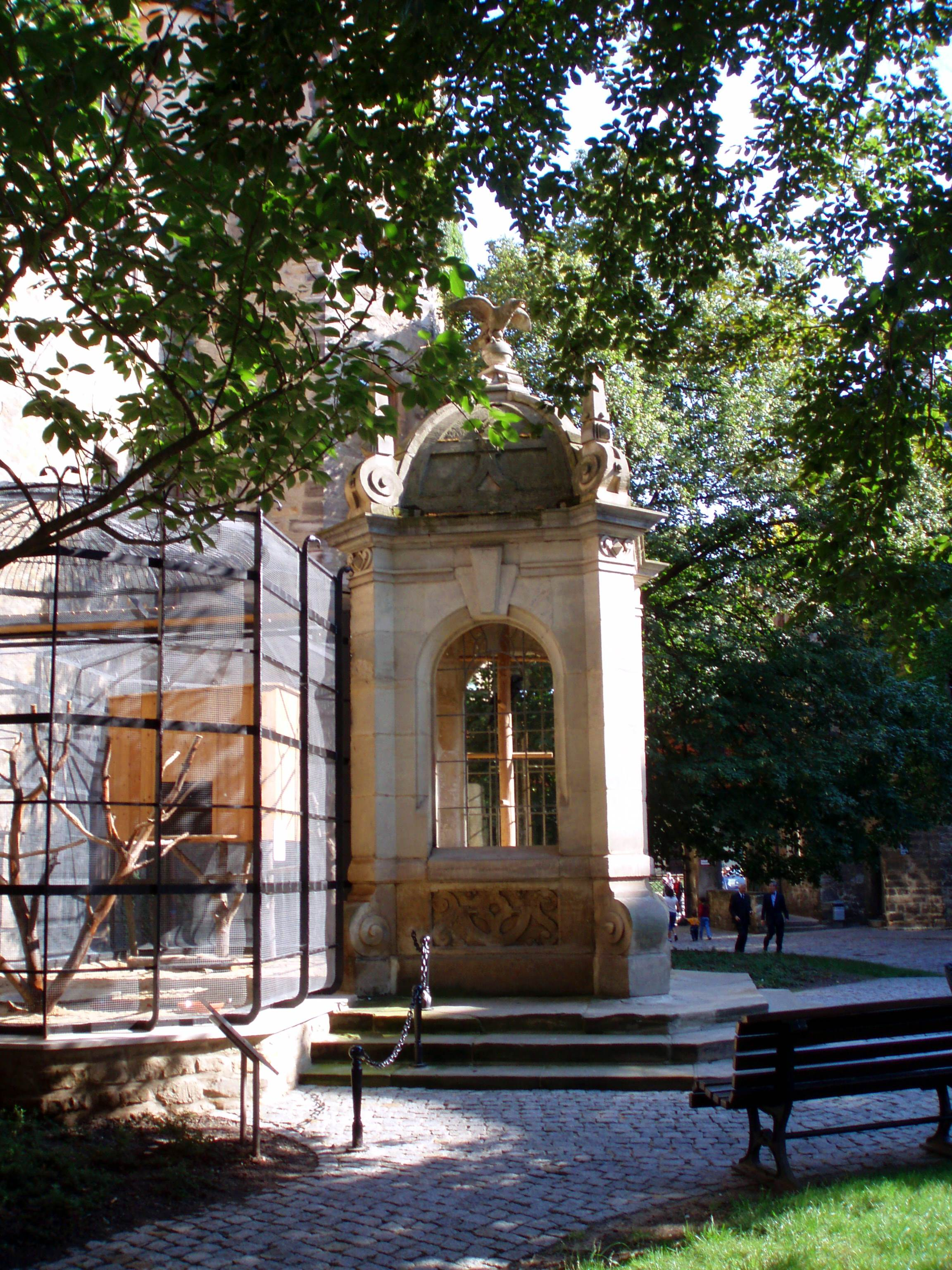 Rabenkäfig in Merseburg